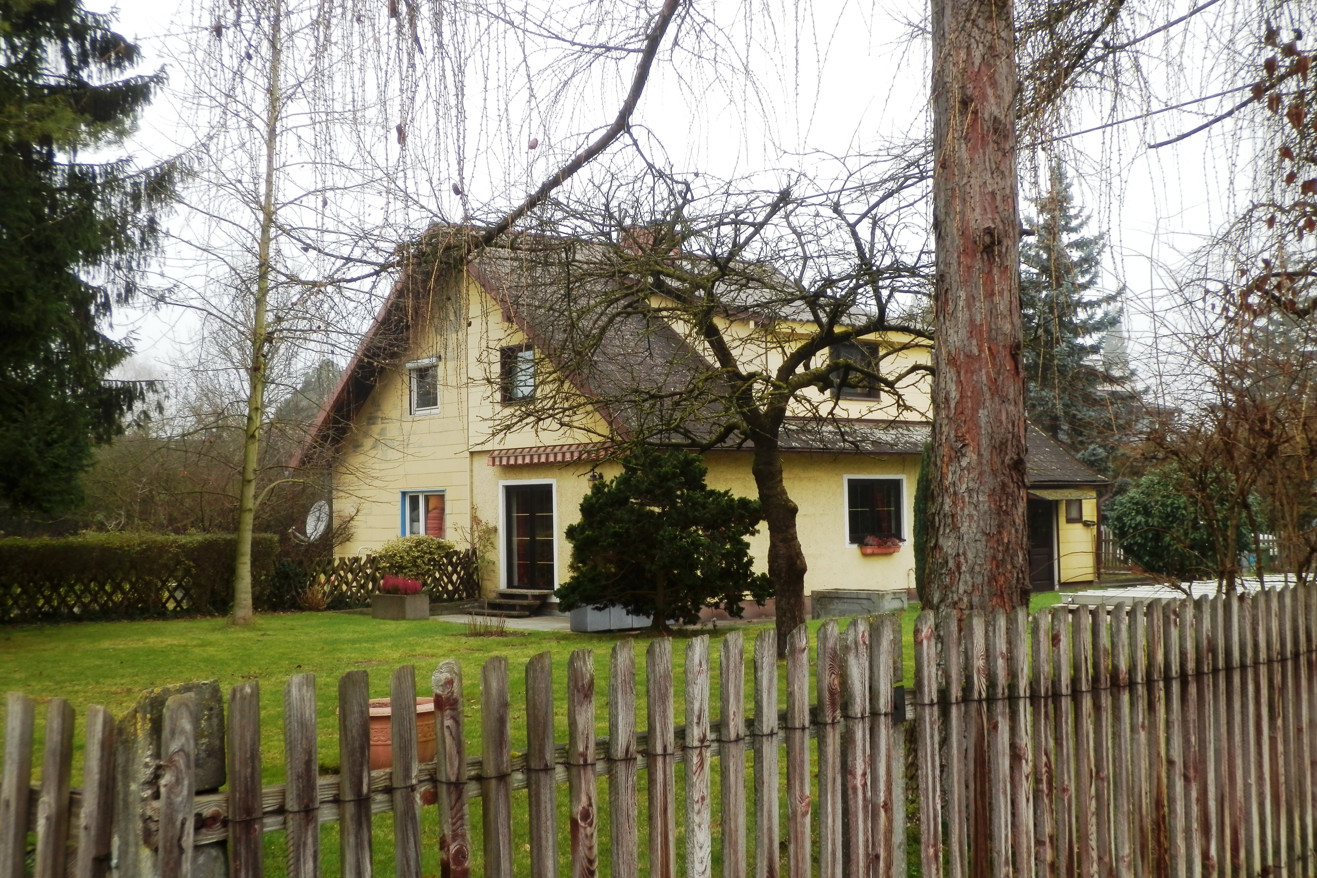 Stadtrandsiedlung Schörgenhub, Linz, Pritzstraße